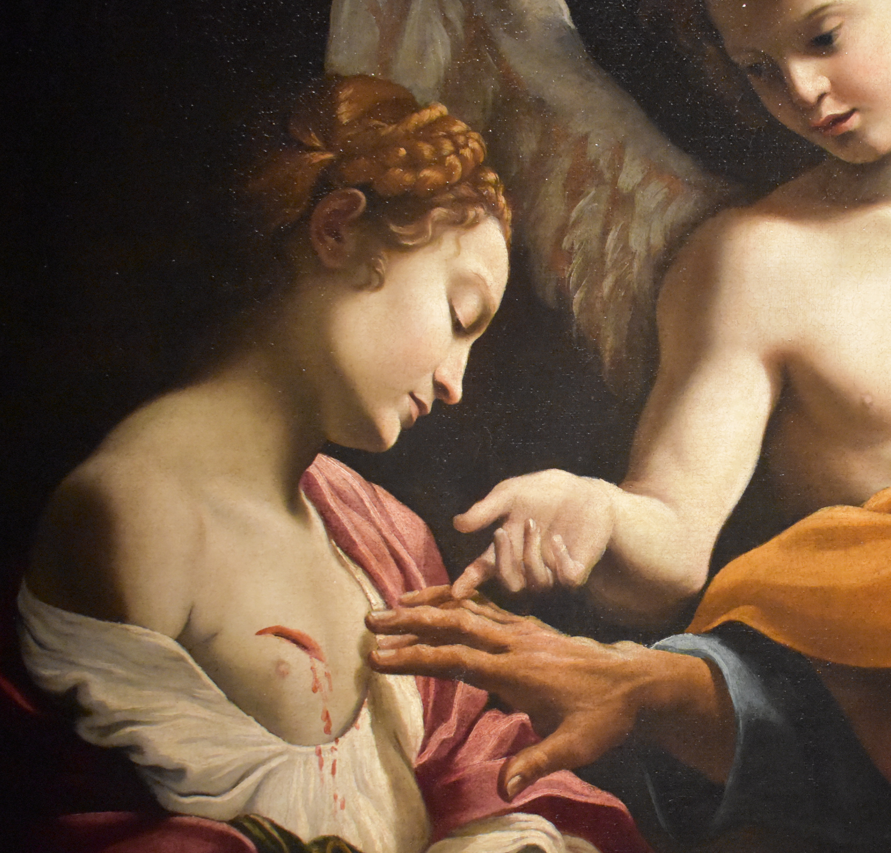 detail